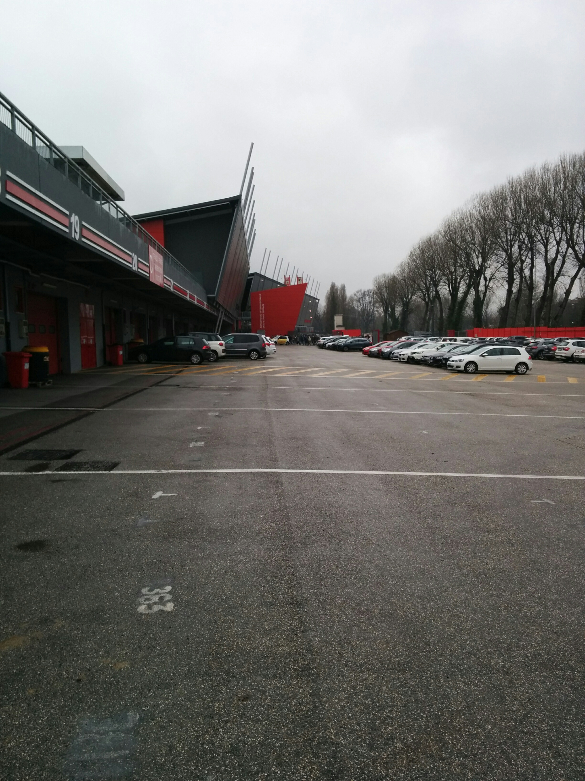 Retro del paddock dell'autodromo di Imola